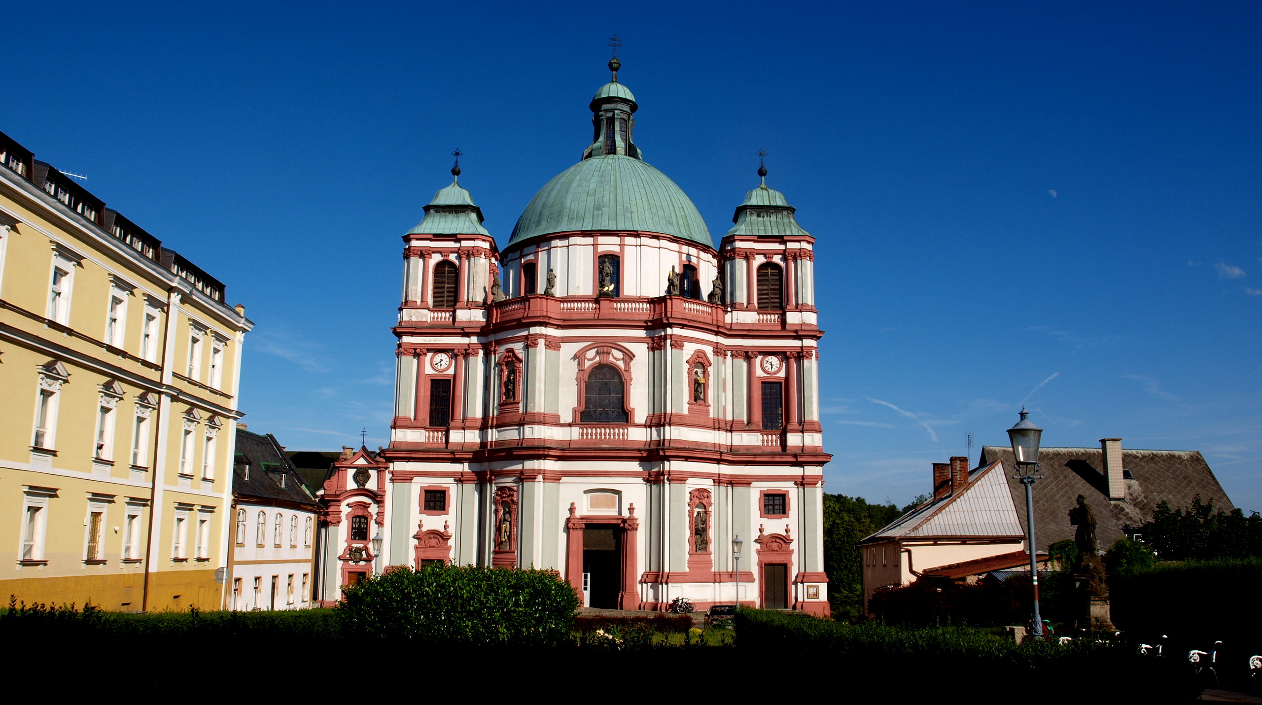 Basilica minor - Kostel sv. Vavřince a sv. Zdislavy v Jablonném v Podještědí